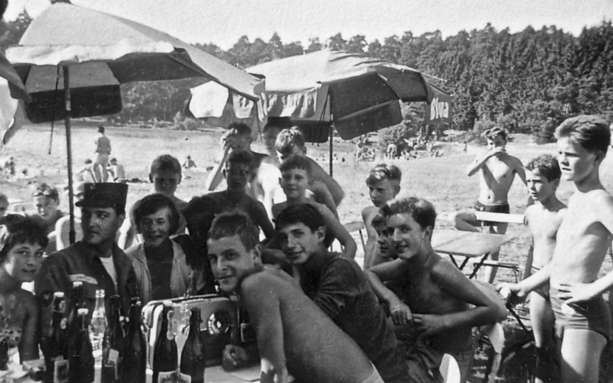 Elvis Presley zu Besuch am Hattsteinweiher, Usingen